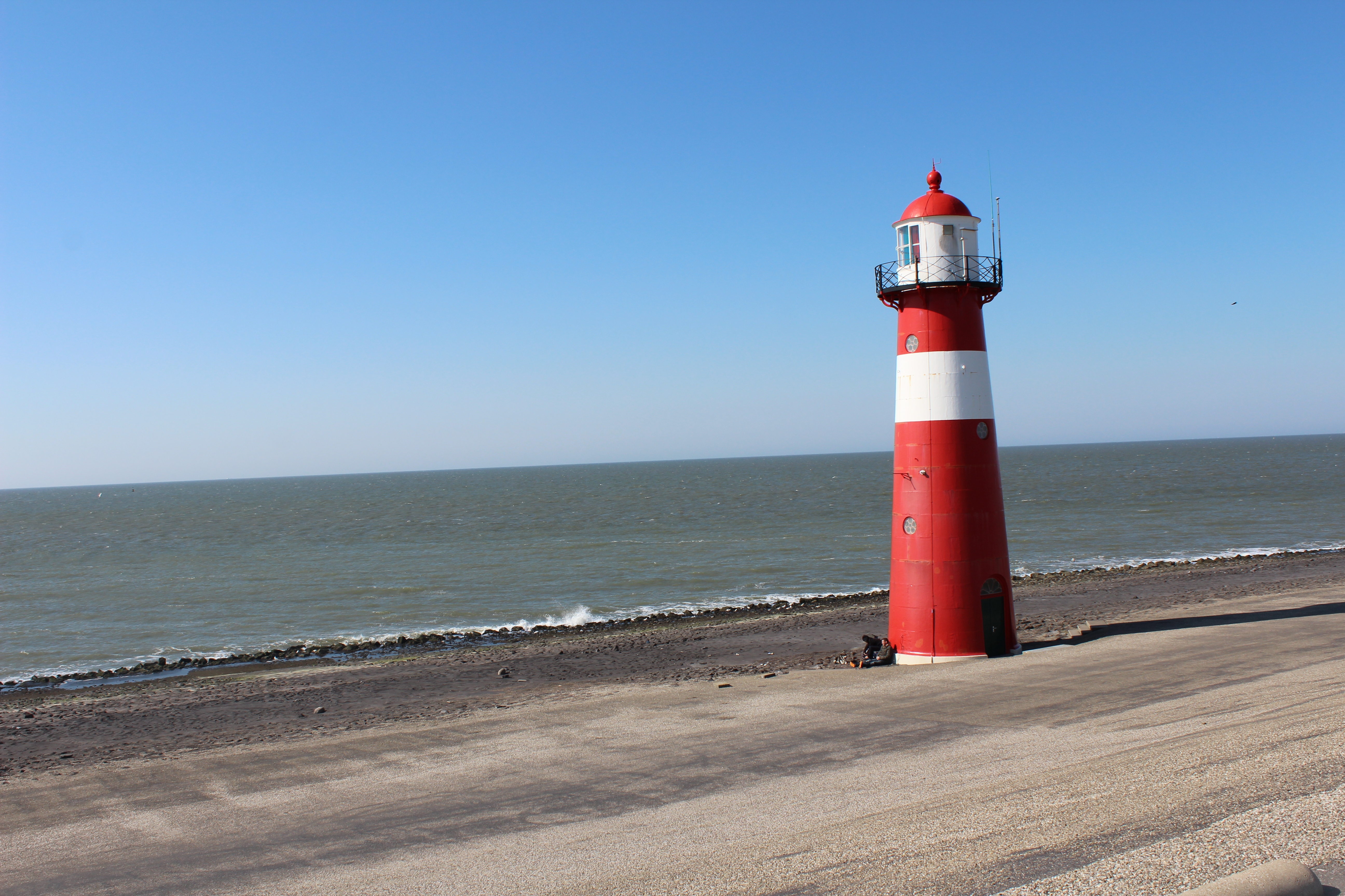 Deitsch: Leuchtturm "IJzeren torentje " in Westkapelle.